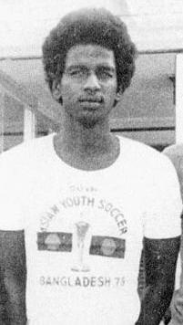 Majed Abdullah in the Iraqi capital Baghdad.